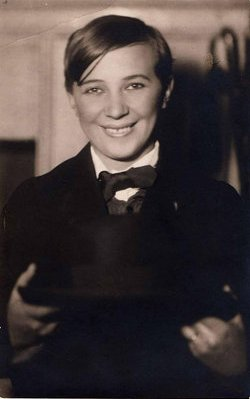 Móricz Zsigmond: Légy jó mindhalálig. Társulat: Nemzeti Színház, Budapest. Bemutató: 1929.11.29. Rendező: Hevesi Sándor. Nyilas Misi: Vaszary Piri.